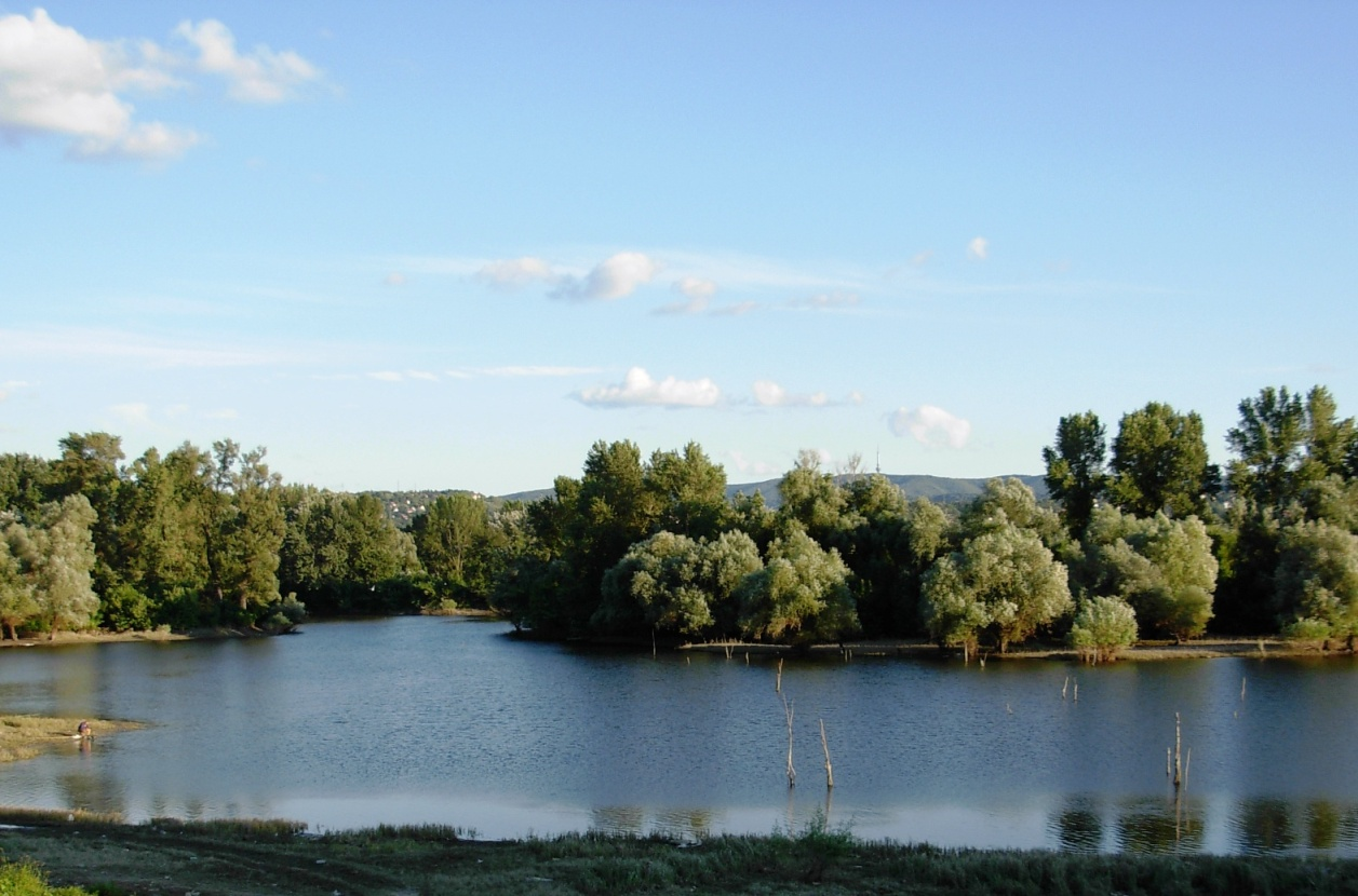 Šodroš, rukavac Dunava koji razdvaja Ribarsko i Kameničko ostrvo. Nalazi se uzvodno od novosadske plaže Štrand.